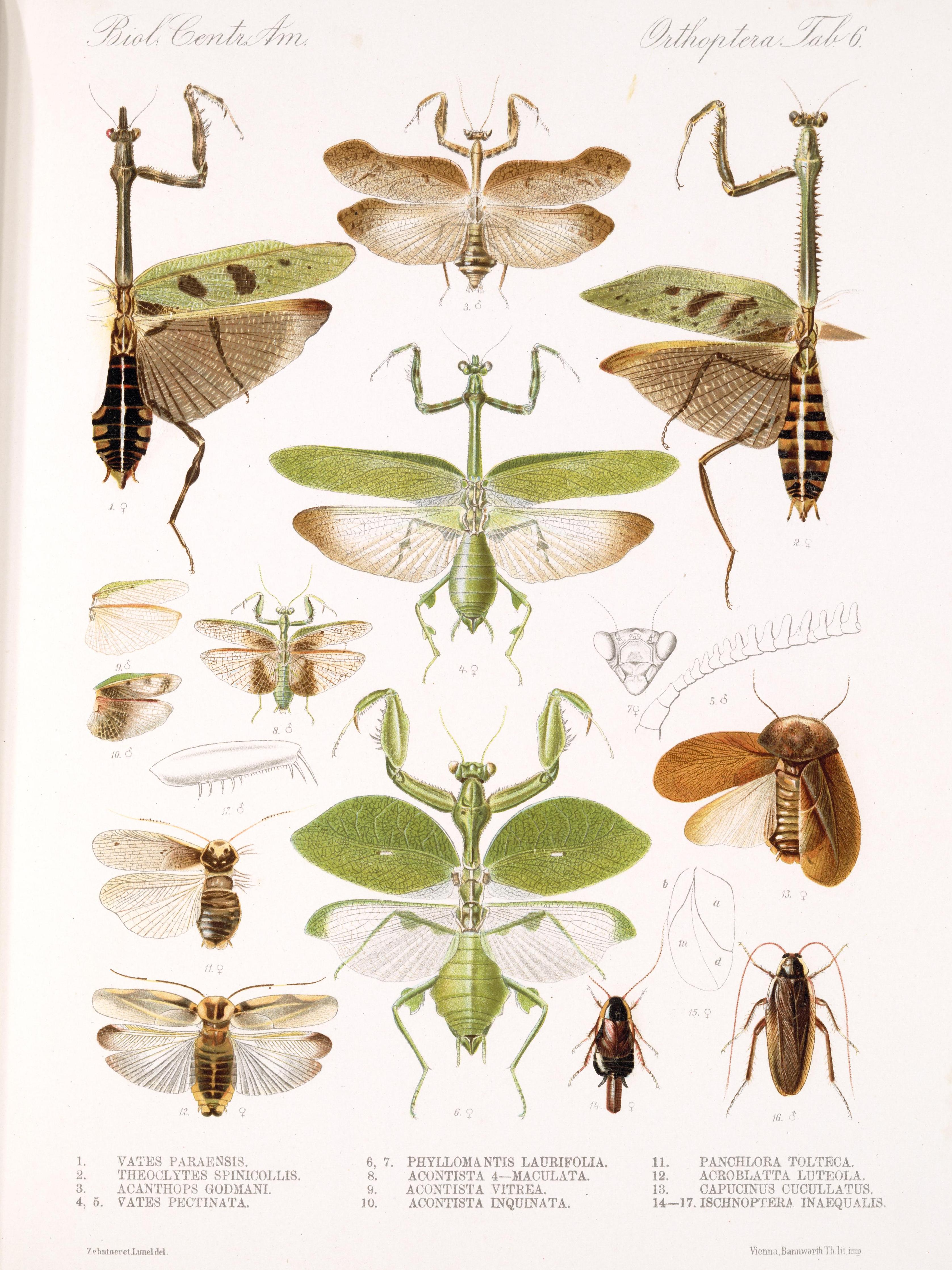 Plate from Biologia centrali-americana. Insecta. Orthoptera London